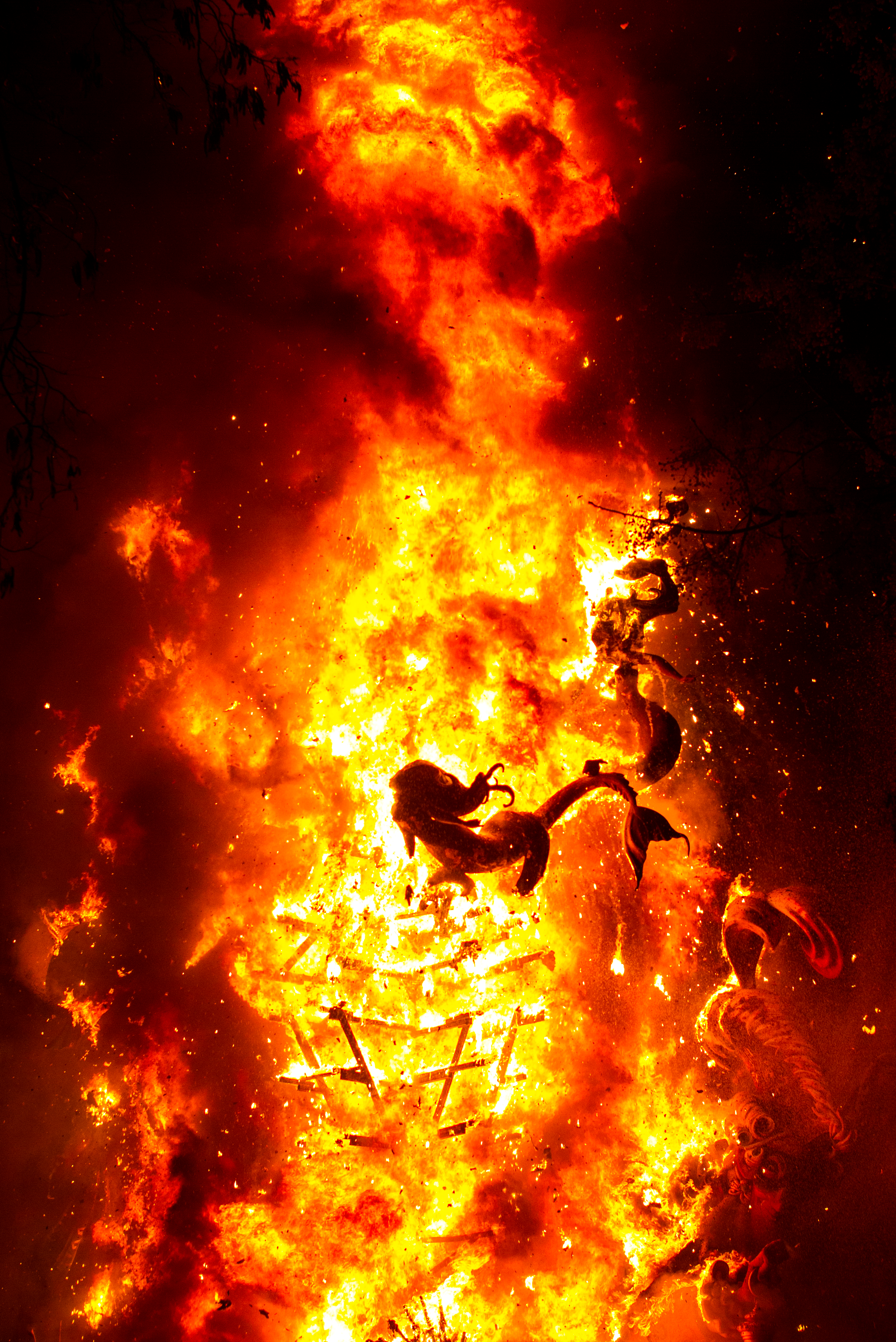 Cremá.